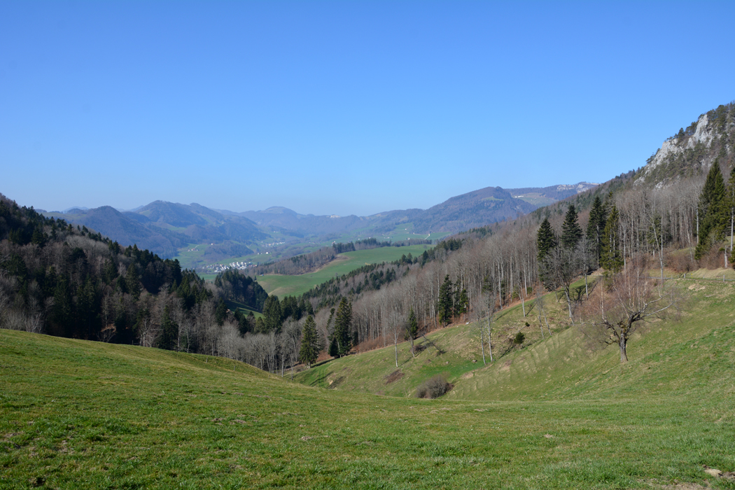 Die Breitenhöchi zwischen Langenbruck und Mümliswil